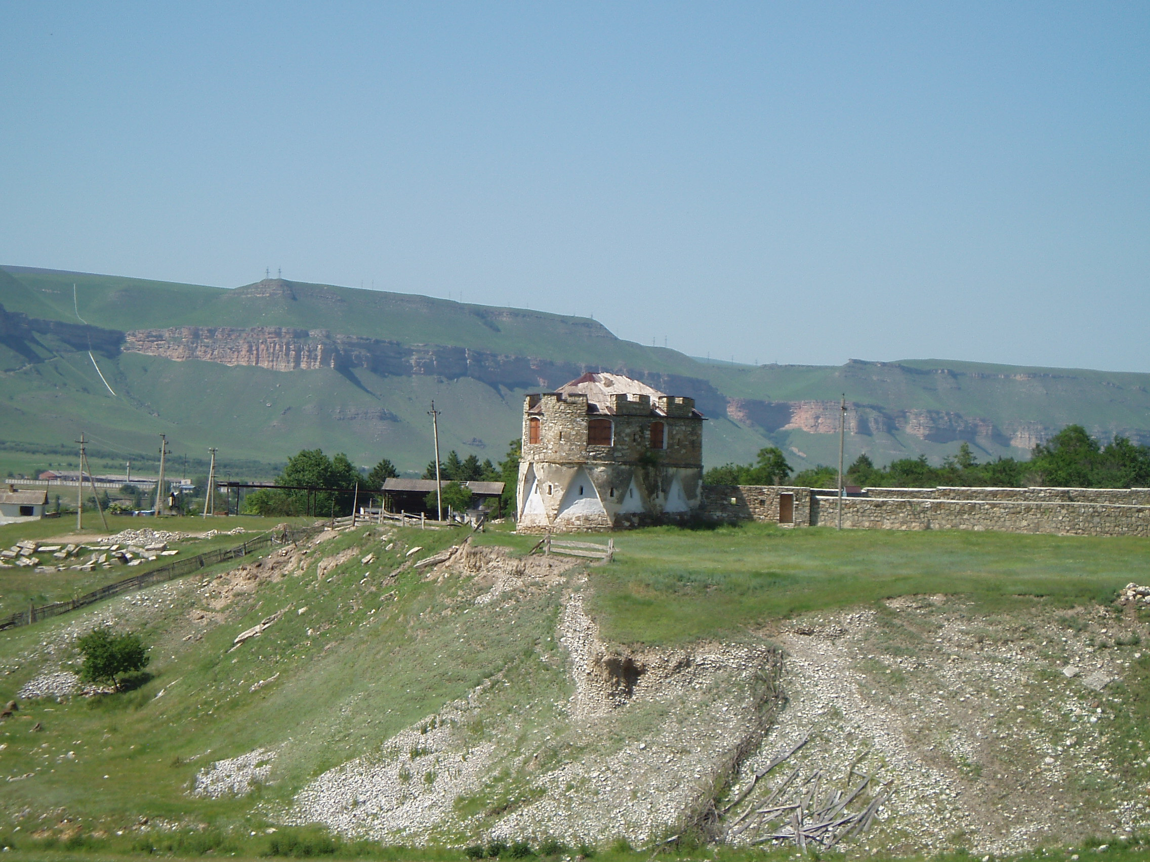 Остатки укрепления времен Кавказской войны 19 века. Станица Красногорская, Карачаево-Черкесия.